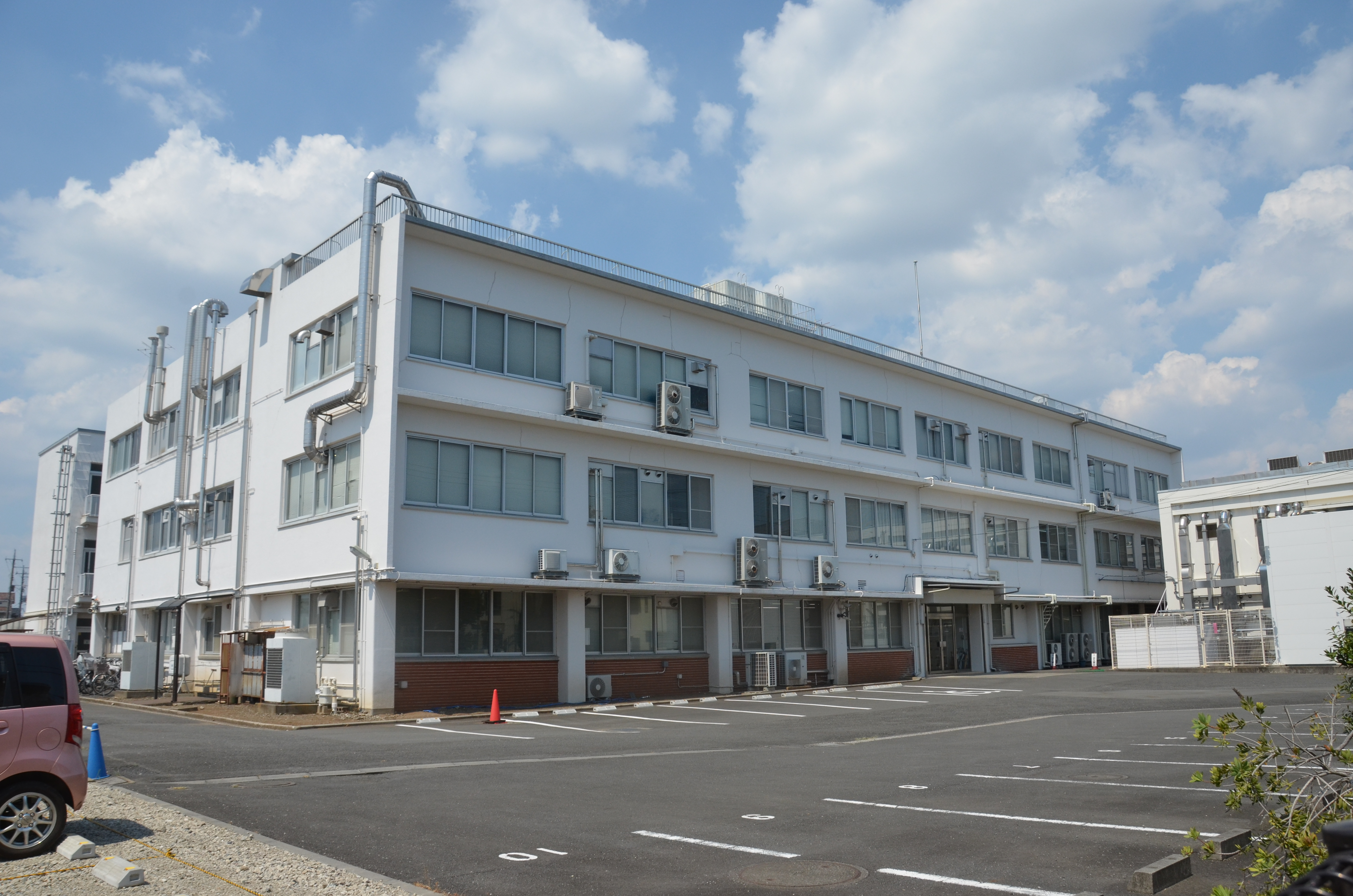 動物医薬品検査所、東京都国分寺市